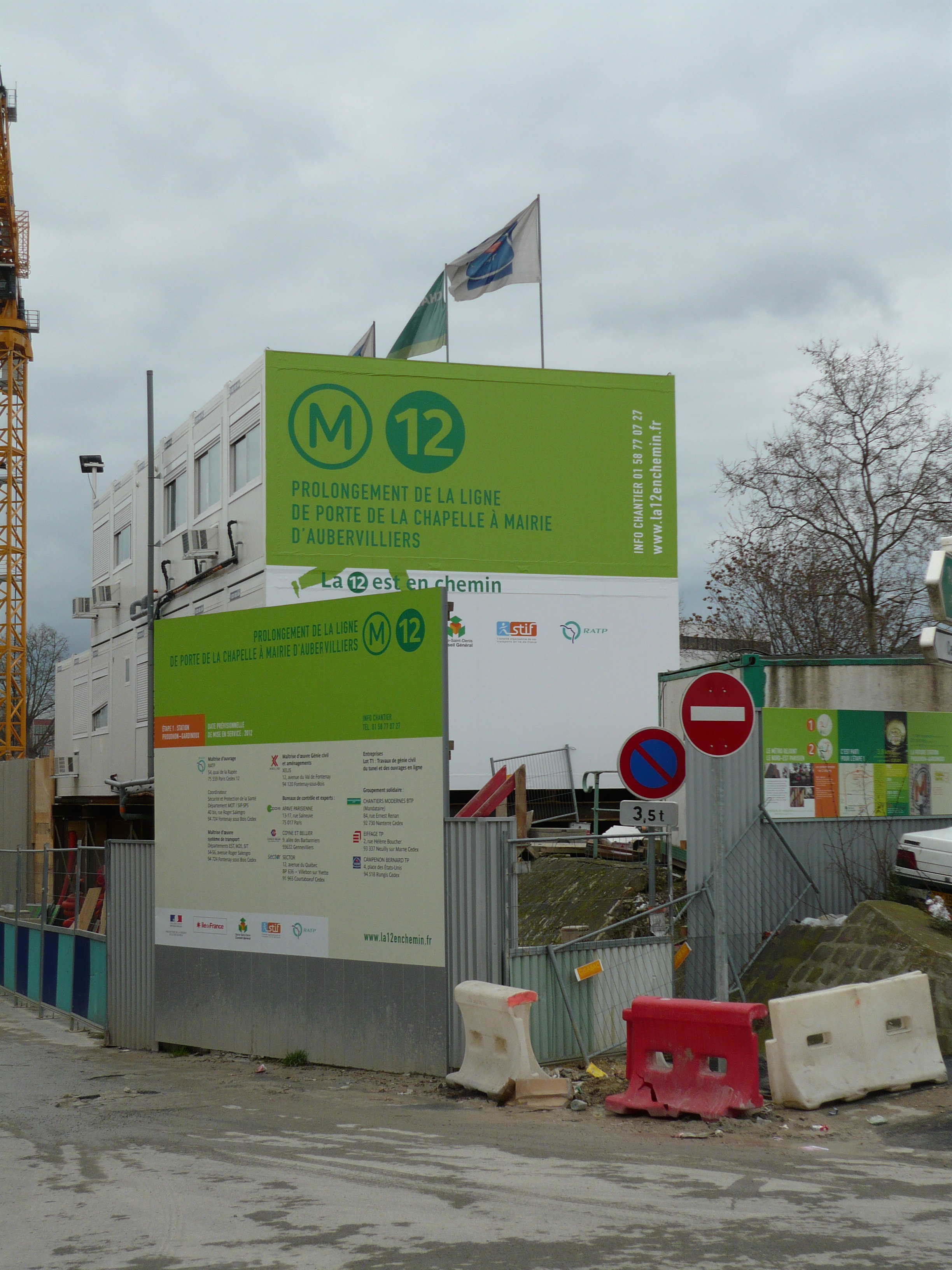 Chantier de métro au Pont de Stains en mars 2009